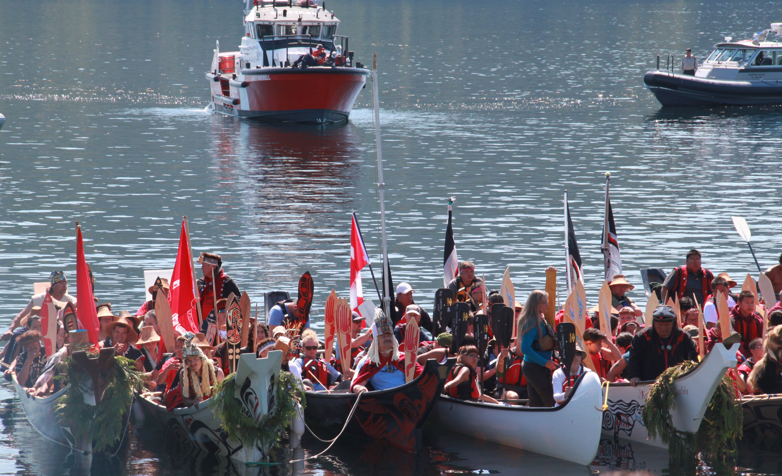 Various canoes